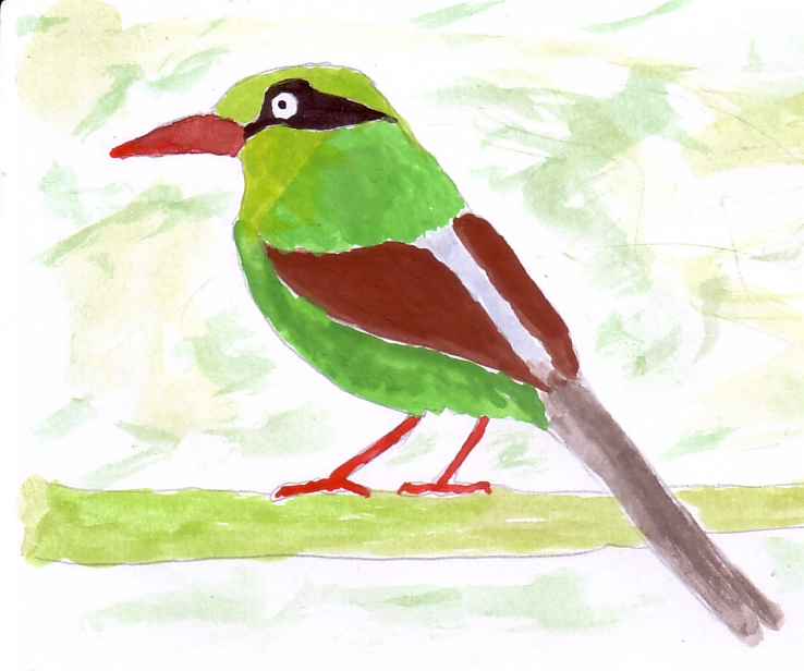 desegnaĵo de mallongvosta pigo